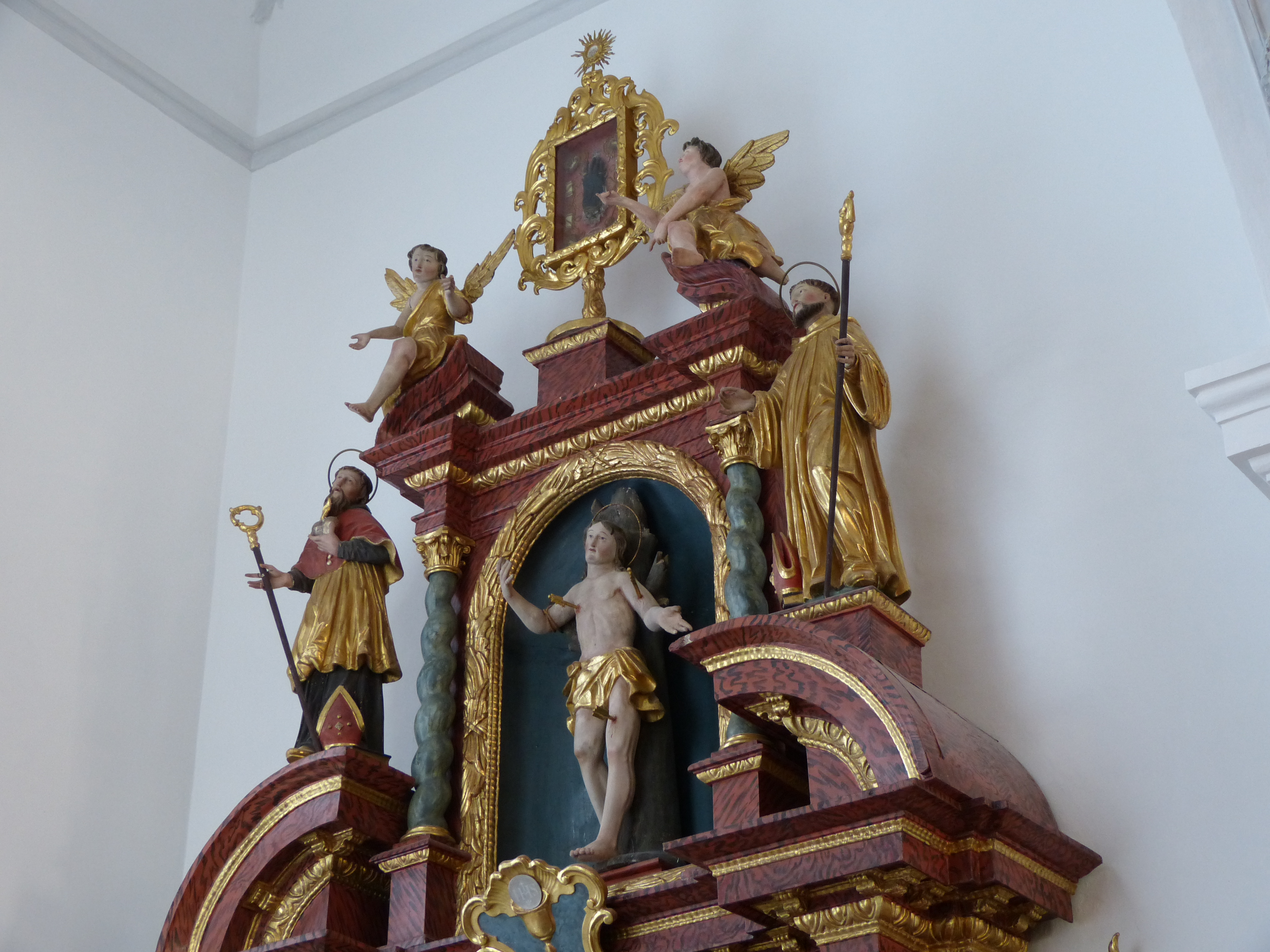 St. Peter und Paul, Lautrach, Landkreis Unterallgäu, Bayern